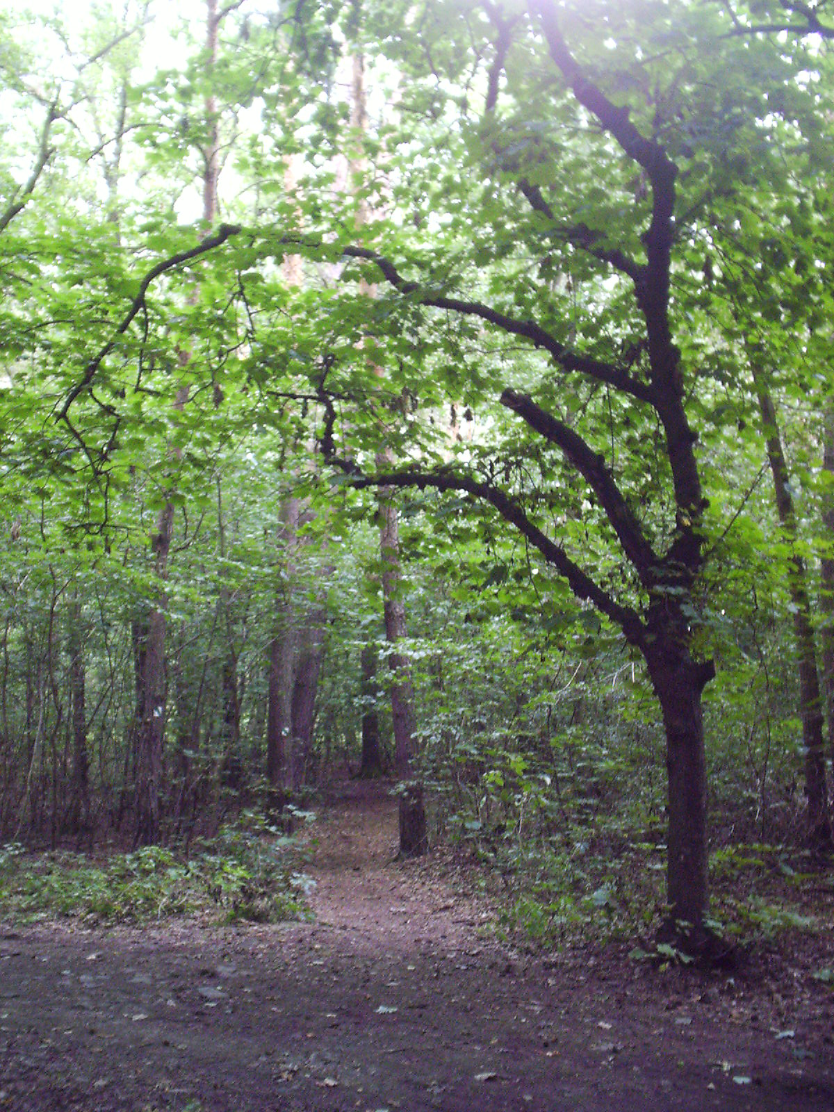 Černá stráň je přírodní památka ev. č. 1349